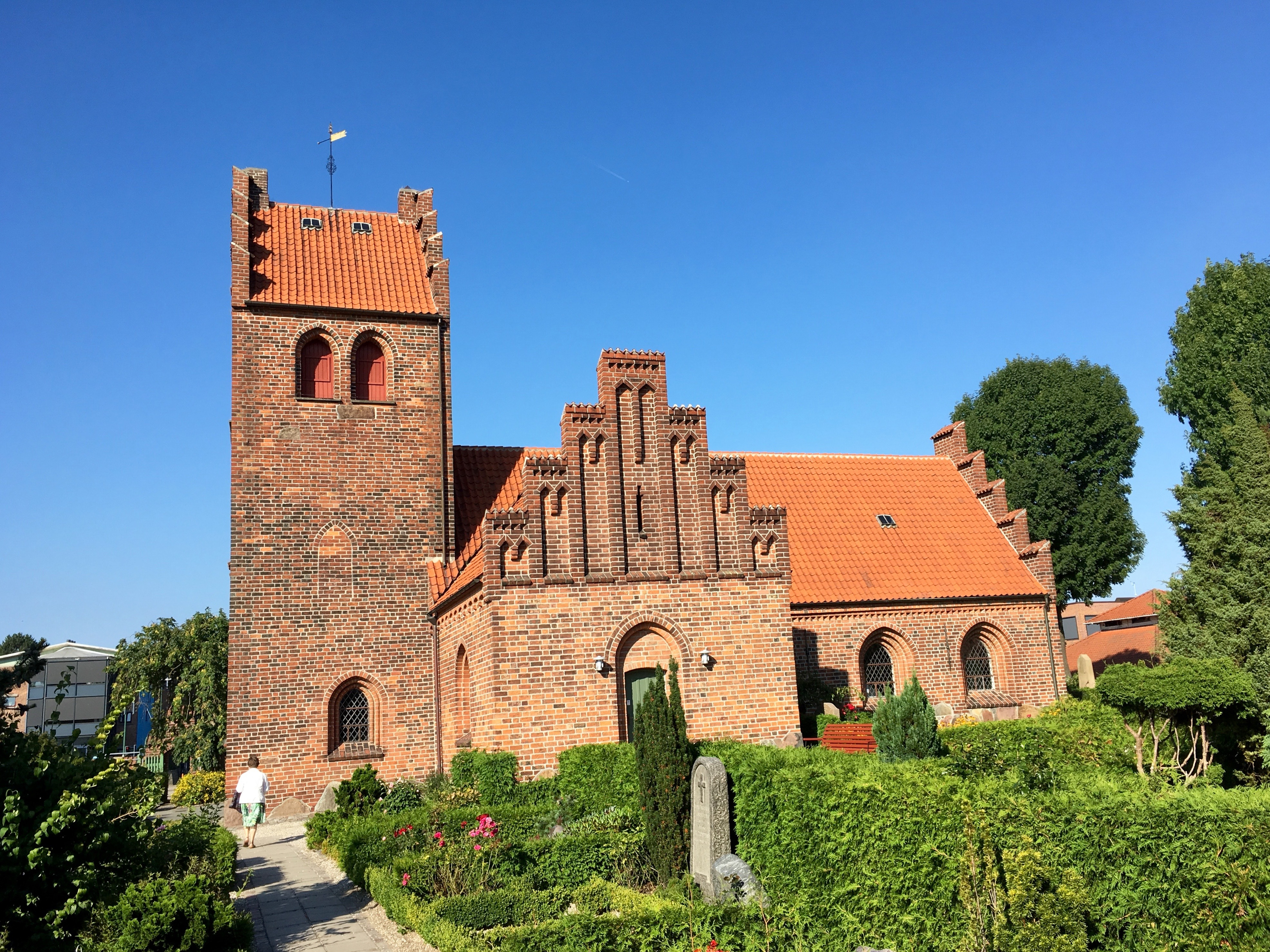 Herlev Kirke, Sjælland